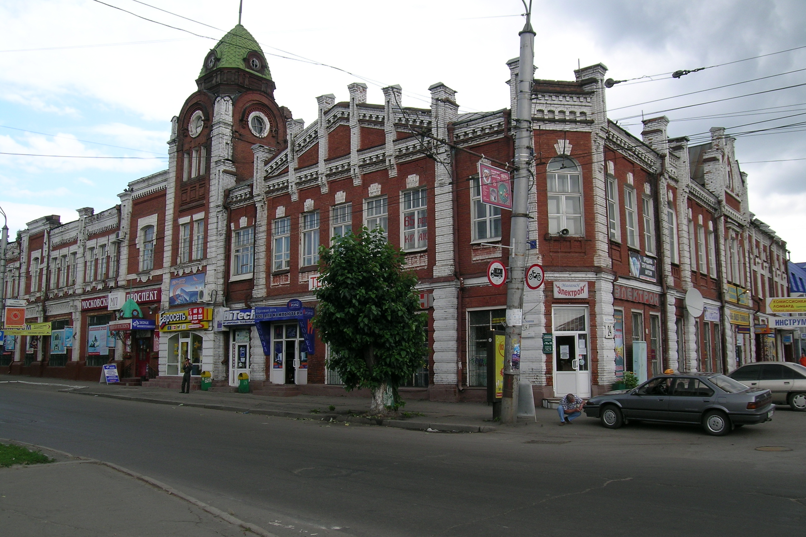 Barnaul. Old town. Photograph taken in 2006. Барнаул. Старый город.